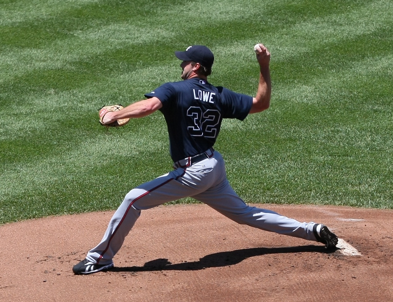 Derek Lowe